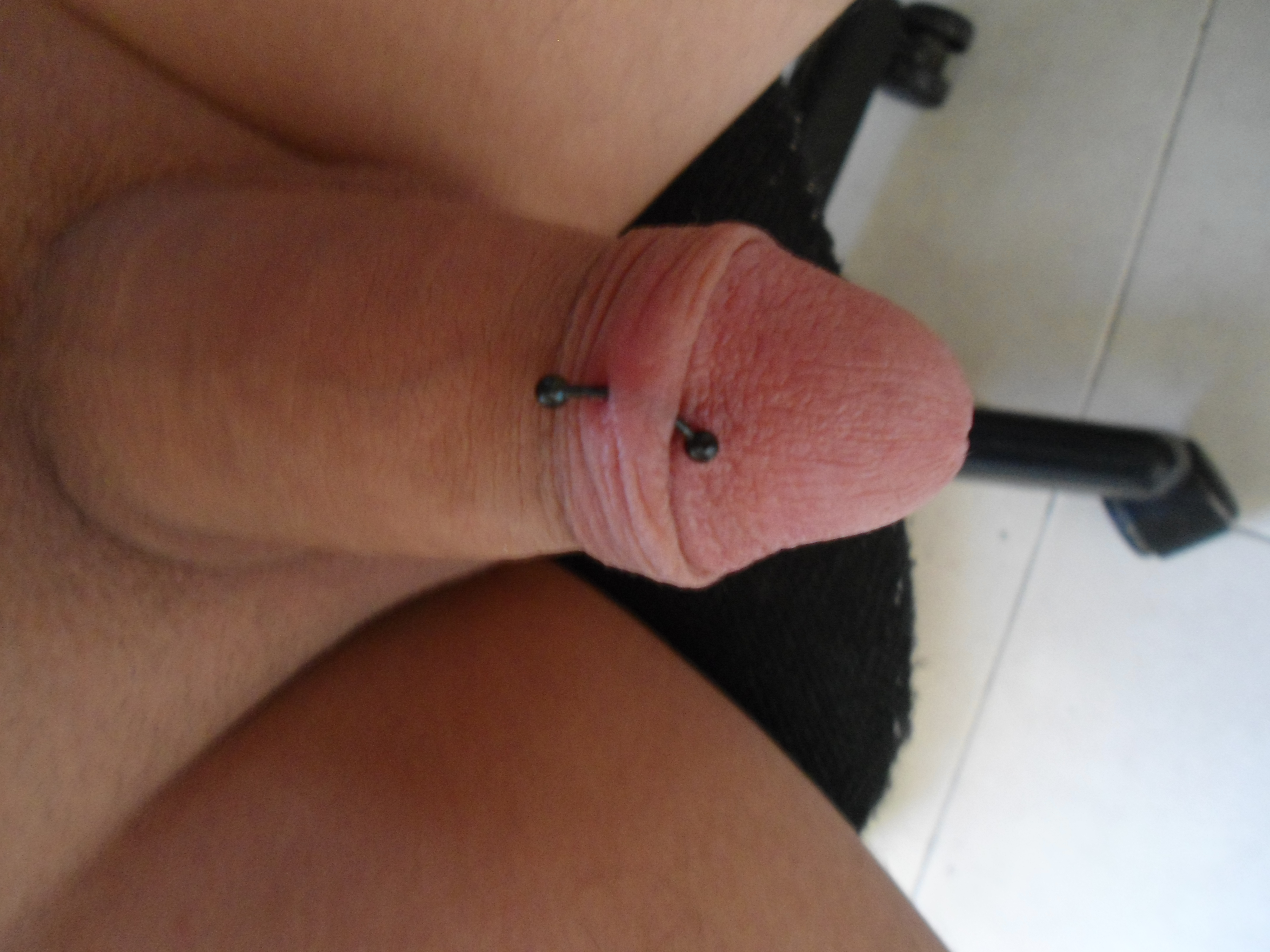 Piercing Foreskin